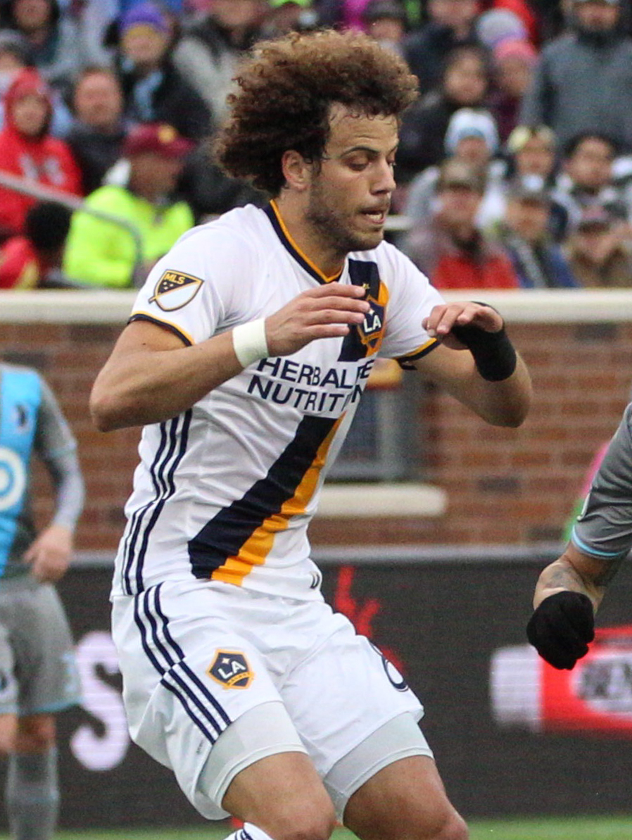 Minnesota United Francisco Calvo Soccer Ticos Costa Rica